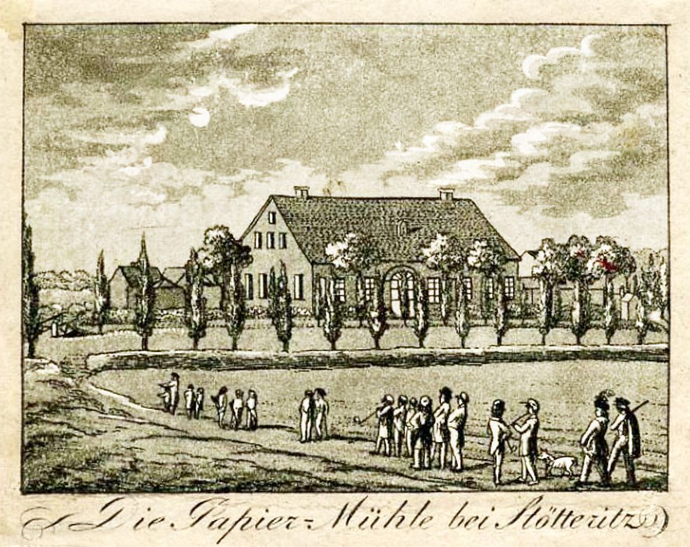 Die Papiermühle bei Stötteritz, ein beliebtes Ausflugslokal der Leipziger